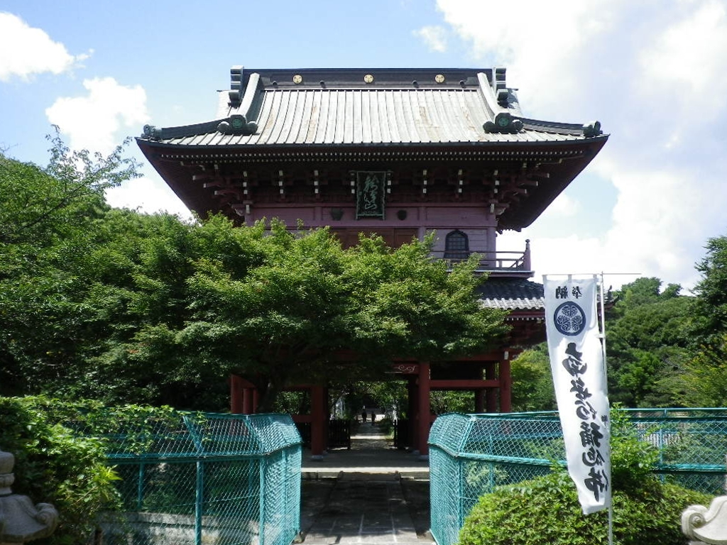 大巌寺山門